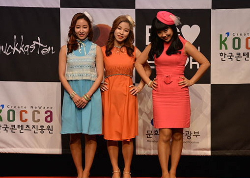 2016 케이팝(K-POP) 해외 쇼케이스 참가 뮤지션 기자간담회 (The Barberettes) (Left - Right) So Hee Park, Sunnie Lee Kyeong, Shinae An Wheeler